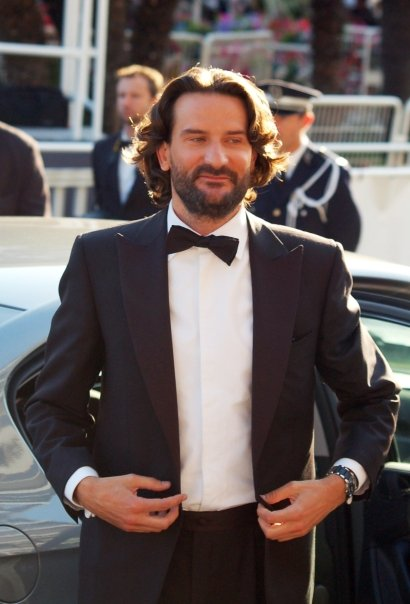 Frédéric Beigbeder au festival de Cannes.